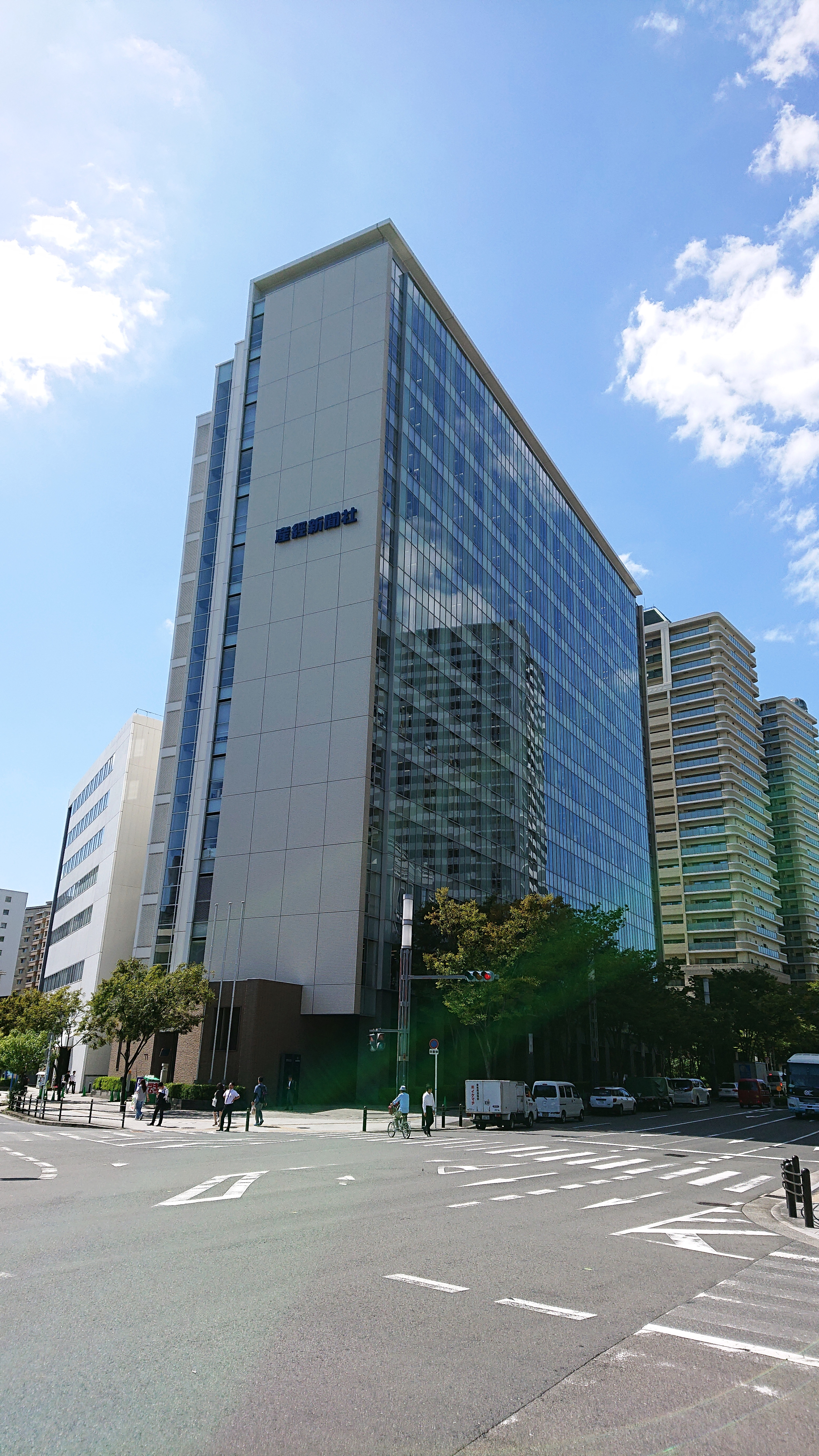 大阪市にある産経新聞大阪本社が入居する難波サンケイビル。